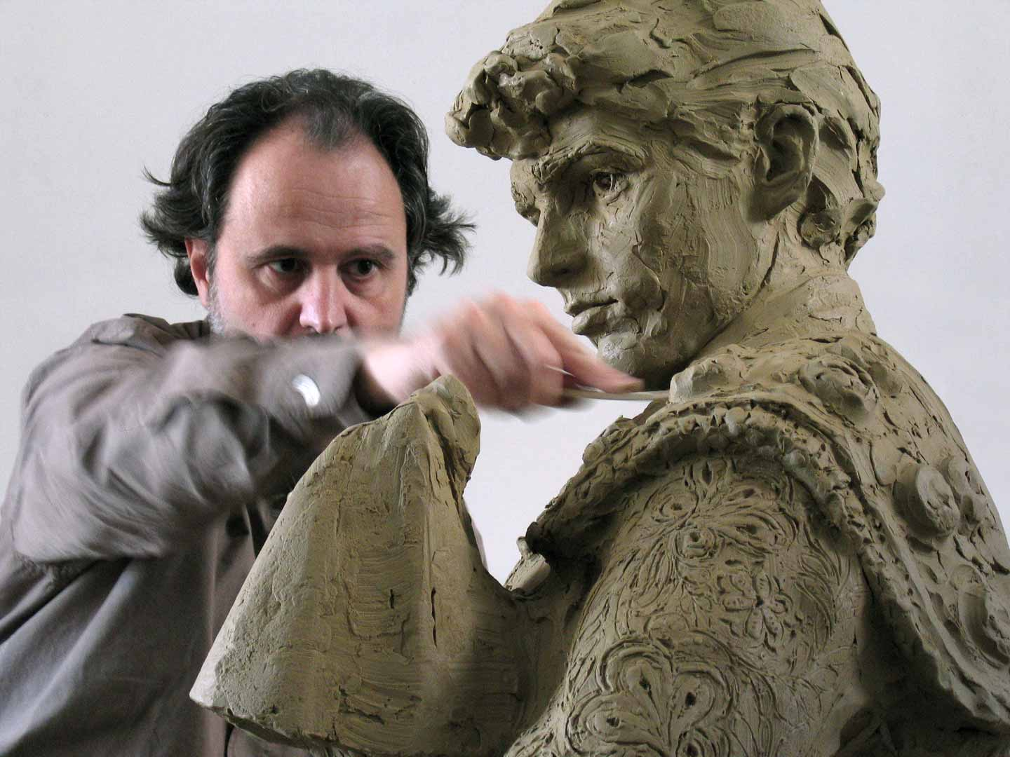 El escultor López-Arza trabajando en su estudio